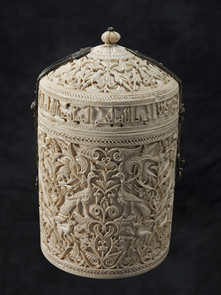 Bote de Zamora (Califato Omeya de Córdoba). Número de inventario: 52113.